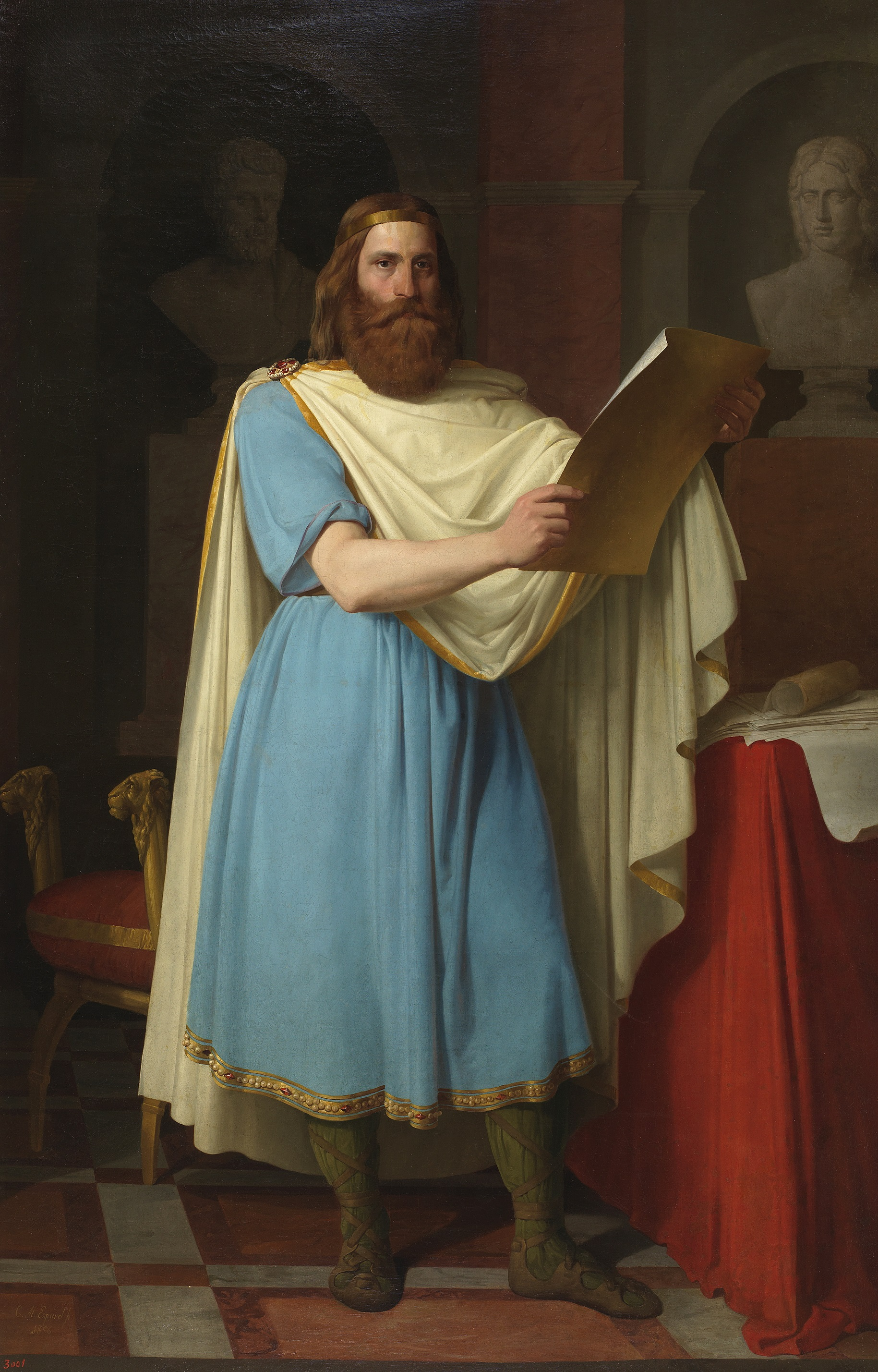 El lienzo representa a Alarico II († 507), que fue rey de los visigodos entre los años 484 y 507. Sucedió a su padre, el rey Eurico y fue sucedido a su vez por su hijo, el rey Gesaleico. El rey Alarico II aparece portando barba, vestido con túnica y manto y sujetando un pergamino. Alarico II murió en la batalla de Vouillé, librada en 507, que enfrentó a los visigodos con las tropas del rey franco Clodoveo I. La derrota de los visigodos en esta batalla supuso la desaparición del reino de Tolosa, pues las posesiones galas, excepto la Narbonense, se perdieron. El lienzo pertenece a la colección del Museo del Prado, aunque se encuentra depositado en el Congreso de los Diputados de España.